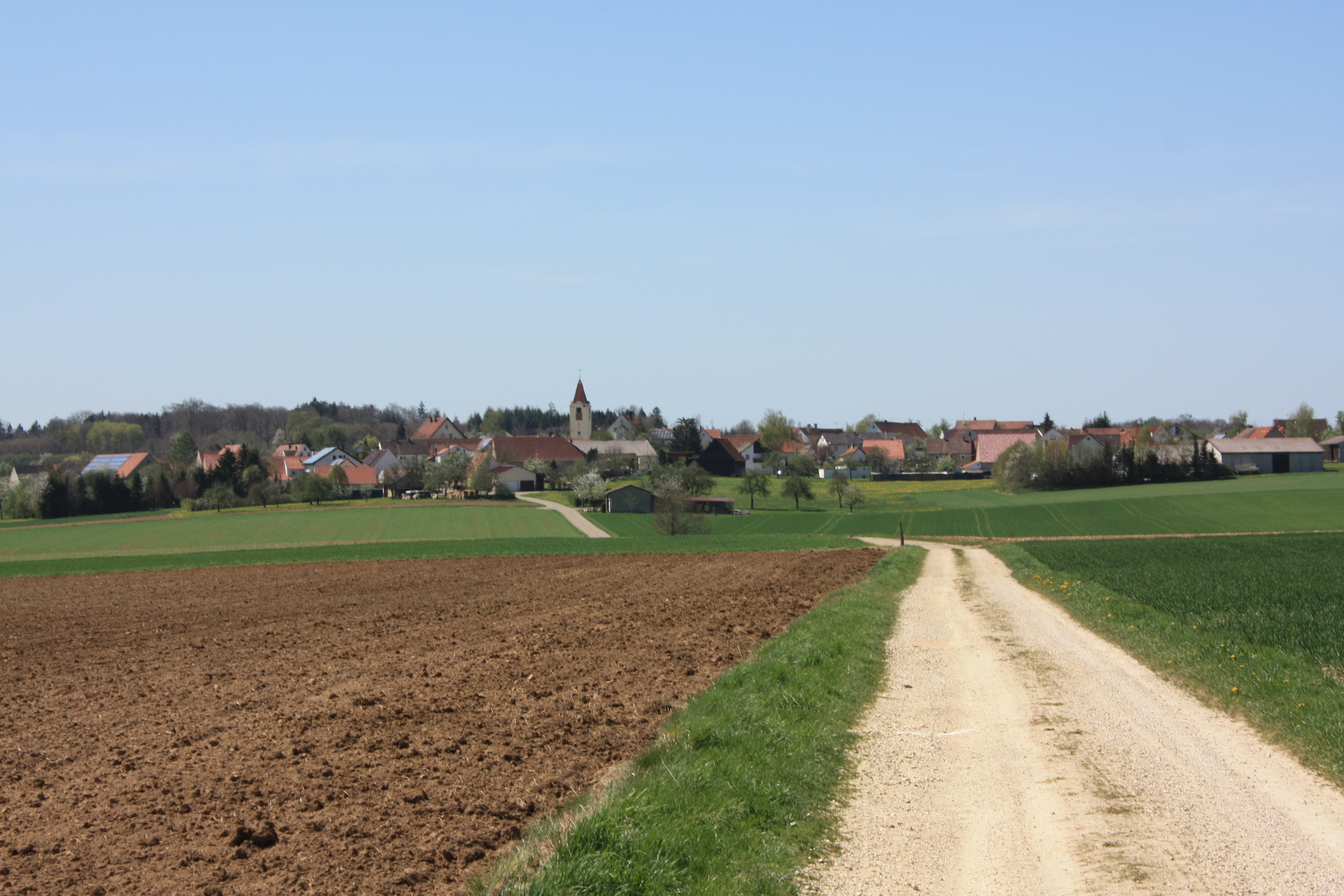 Stadtteil Schweindorf (Neresheim) von Osten (bayerische Grenze) fotografiert